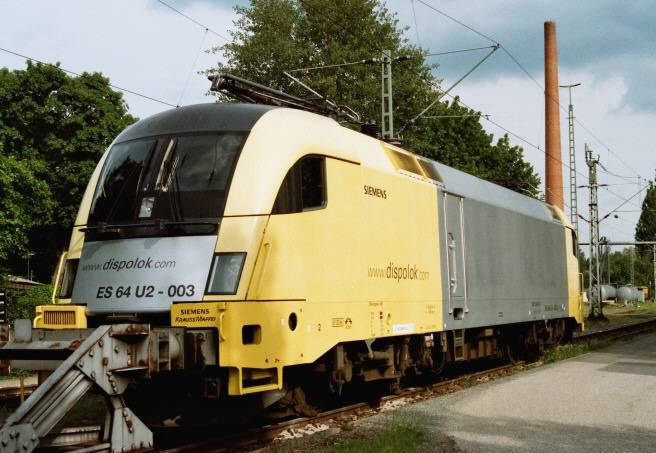 Dispolok ES 64 U2 - 003 in Nürnberg-Gostenhof.